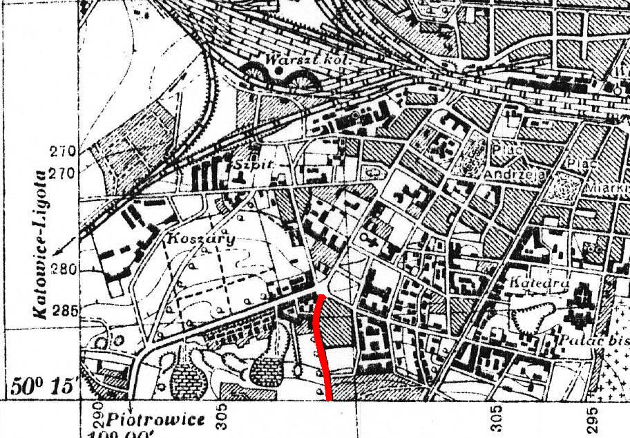 Mapa ulicy Barbary w Katowicach (zaznaczona czerwoną linią) na fragmencie mapy Wojskowego Instytutu Geograficznego w Warszawie z roku 1933 (PAS 47 - SŁUP 28 - H)